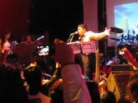 Tokyo Impact! 2012 foto